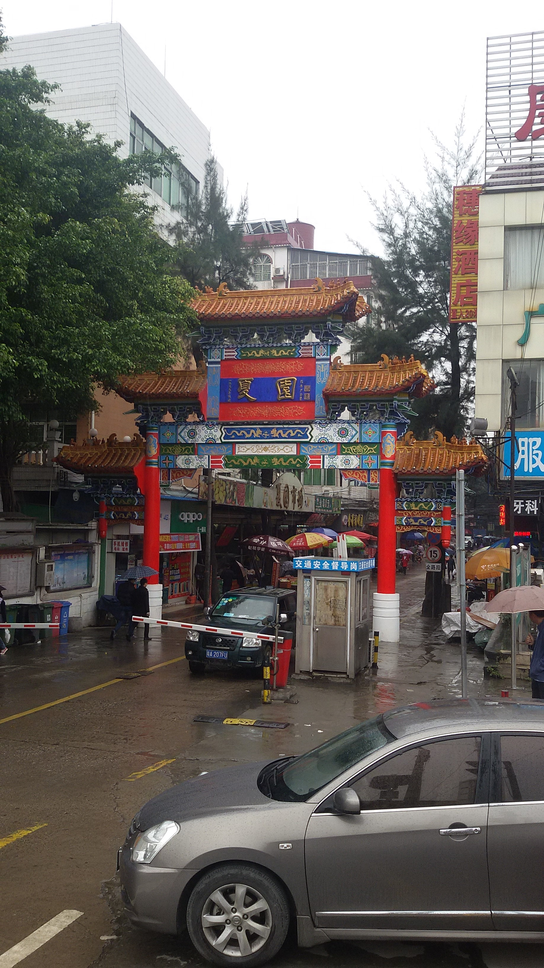 粵語: 夏園嘅牌坊